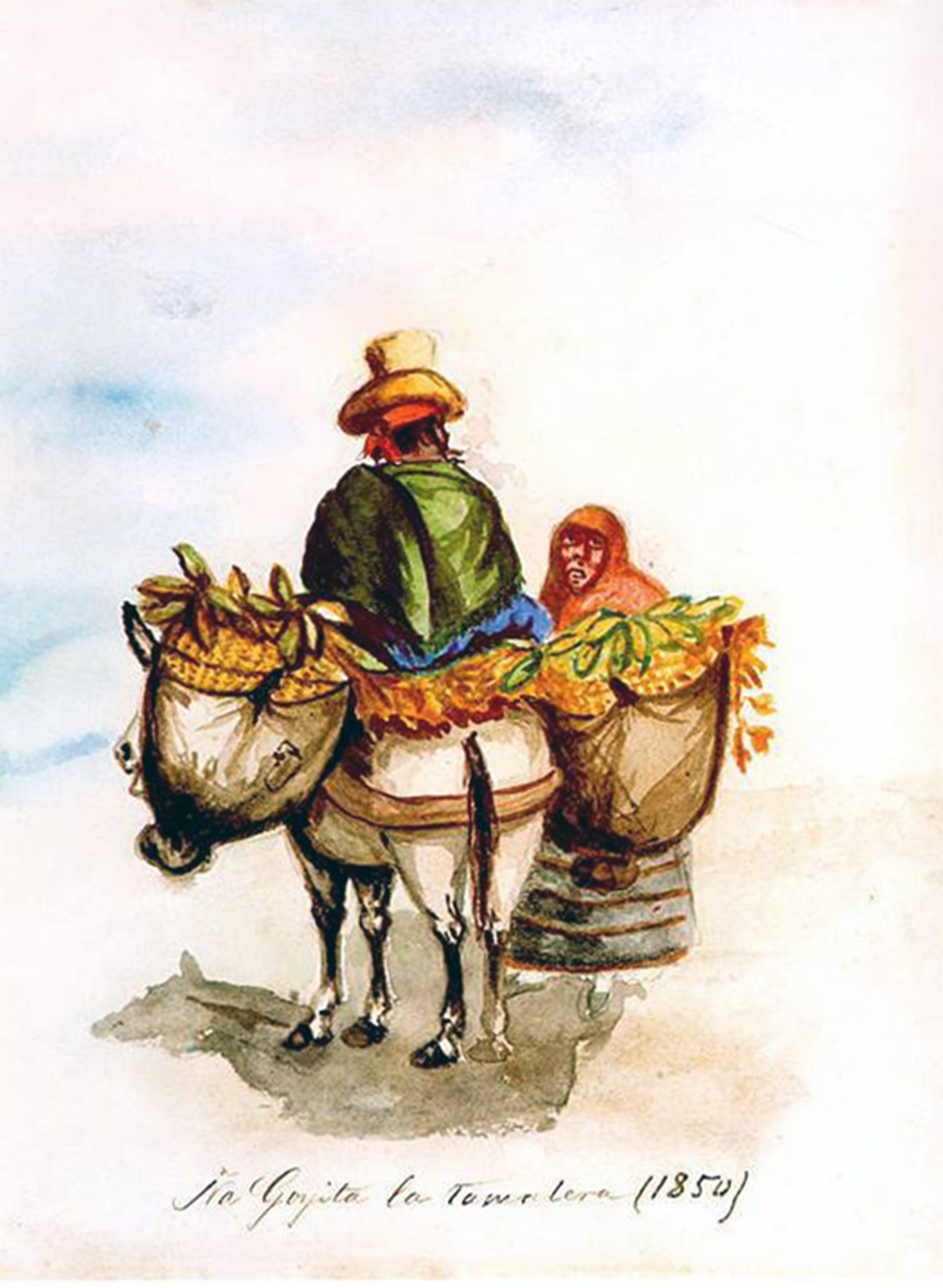 Acuarela de (Lima, 1807 - Lima, 1879)